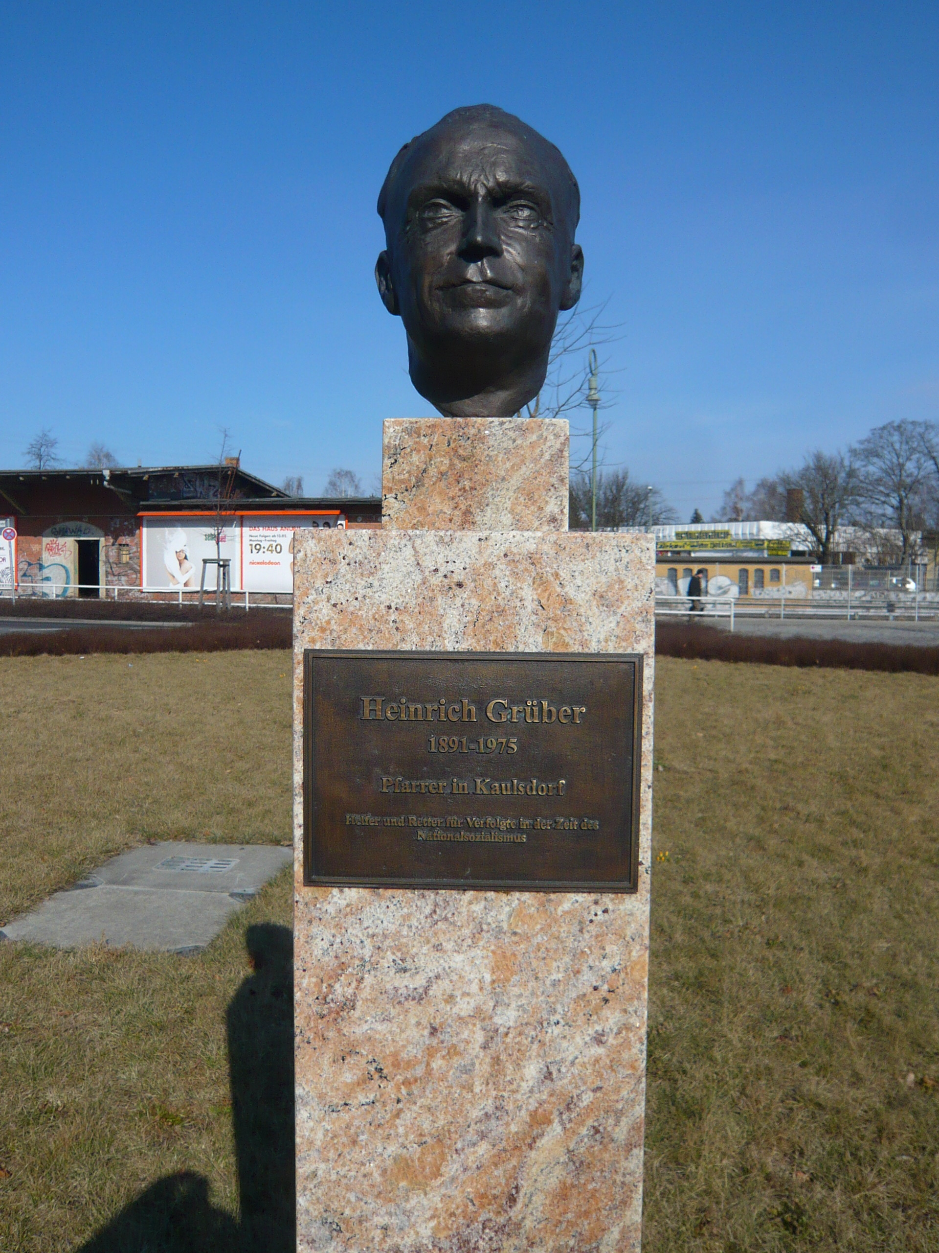 Berlin-Kaulsdorf, Heinrich-Grüber-Platz: Büste des "Namensgebers"